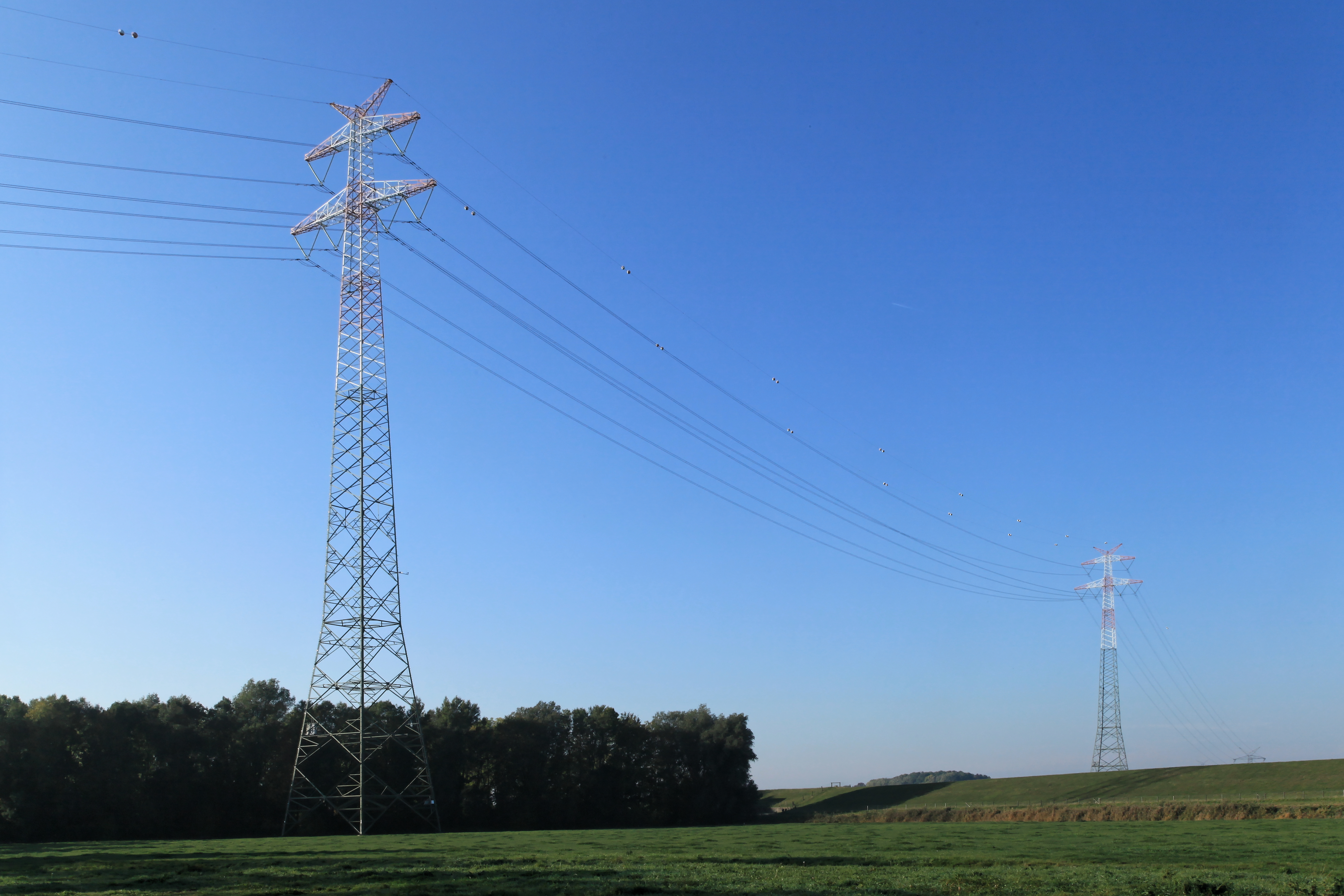 380-kV-Ems-Freileitungskreuzung zwischen Westoverledingen und Weener